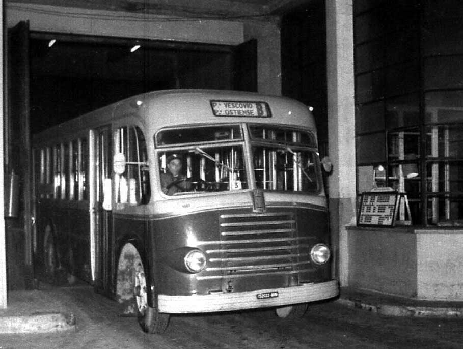 Autobus Fiat 680 RNU Casaro, una volta in forza all'ATAC di Roma